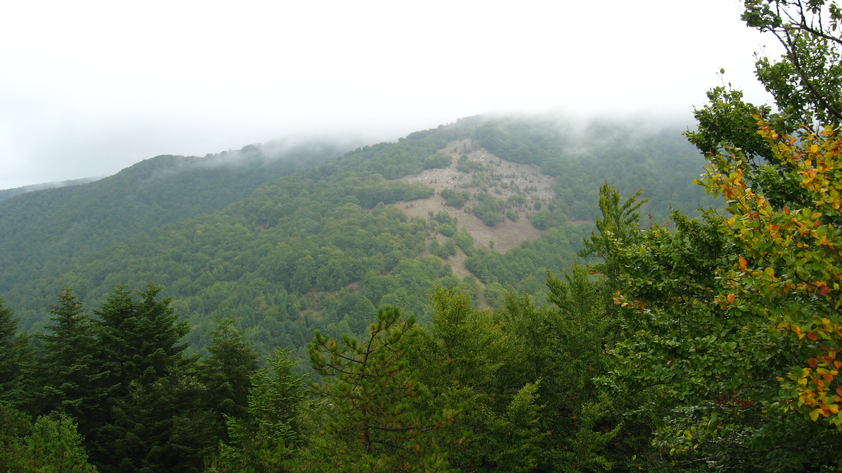 Foreste di faggi ed abeti bianchi ammantano il versante nord di monte Arioso (1.722 m).